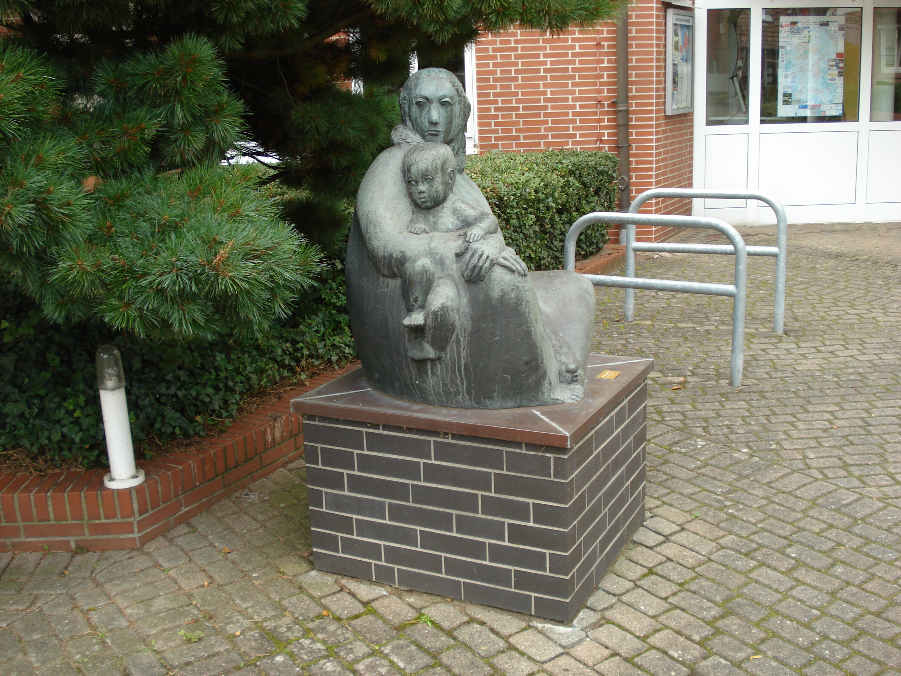 Skulptur "Mutter und Kind" von Martin Irwahn (1979) vor dem Rathaus der Gemeinde Seevetal in Hittfeld